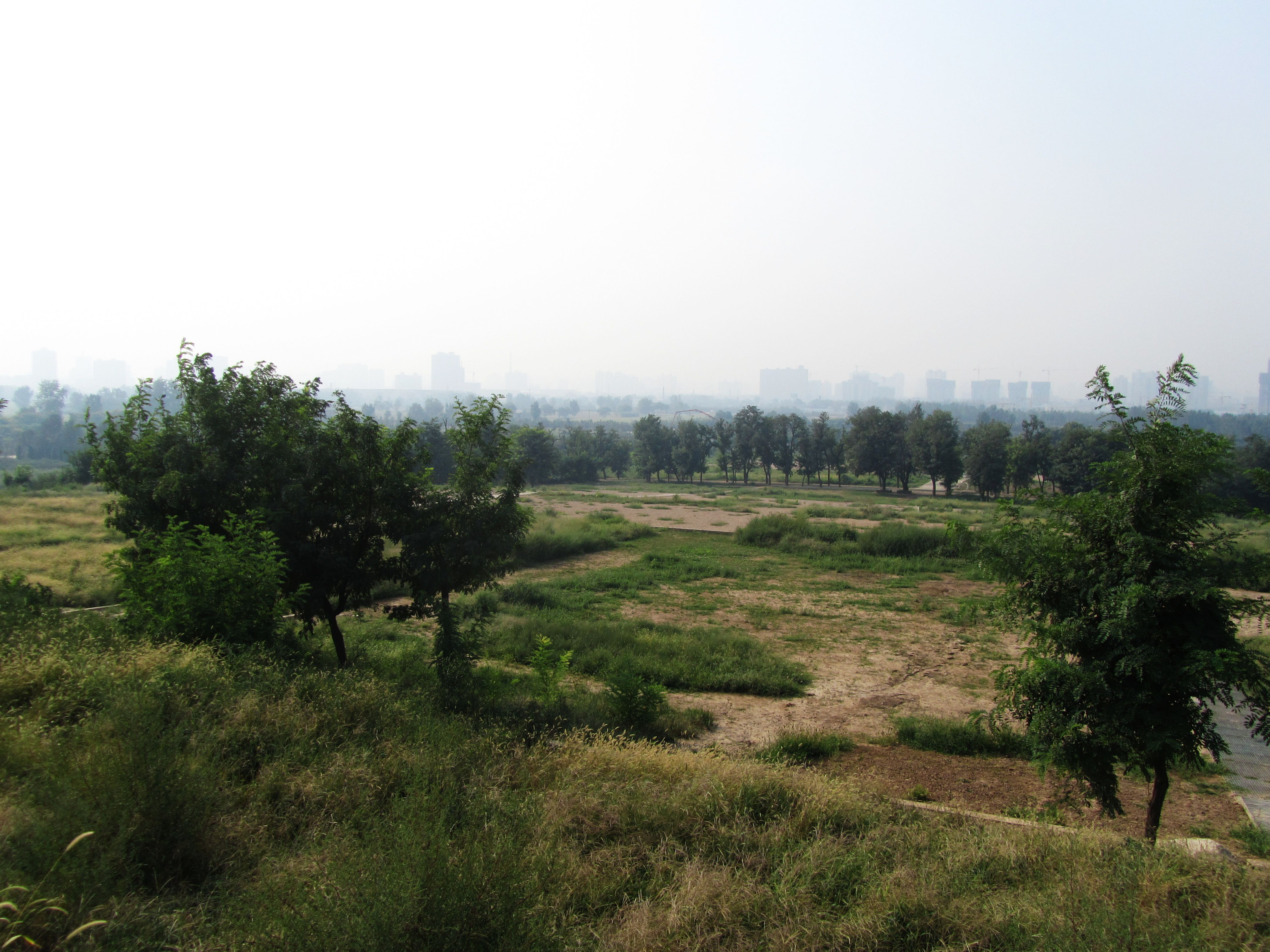 汉长安城遗址之自未央宫前殿向北看。